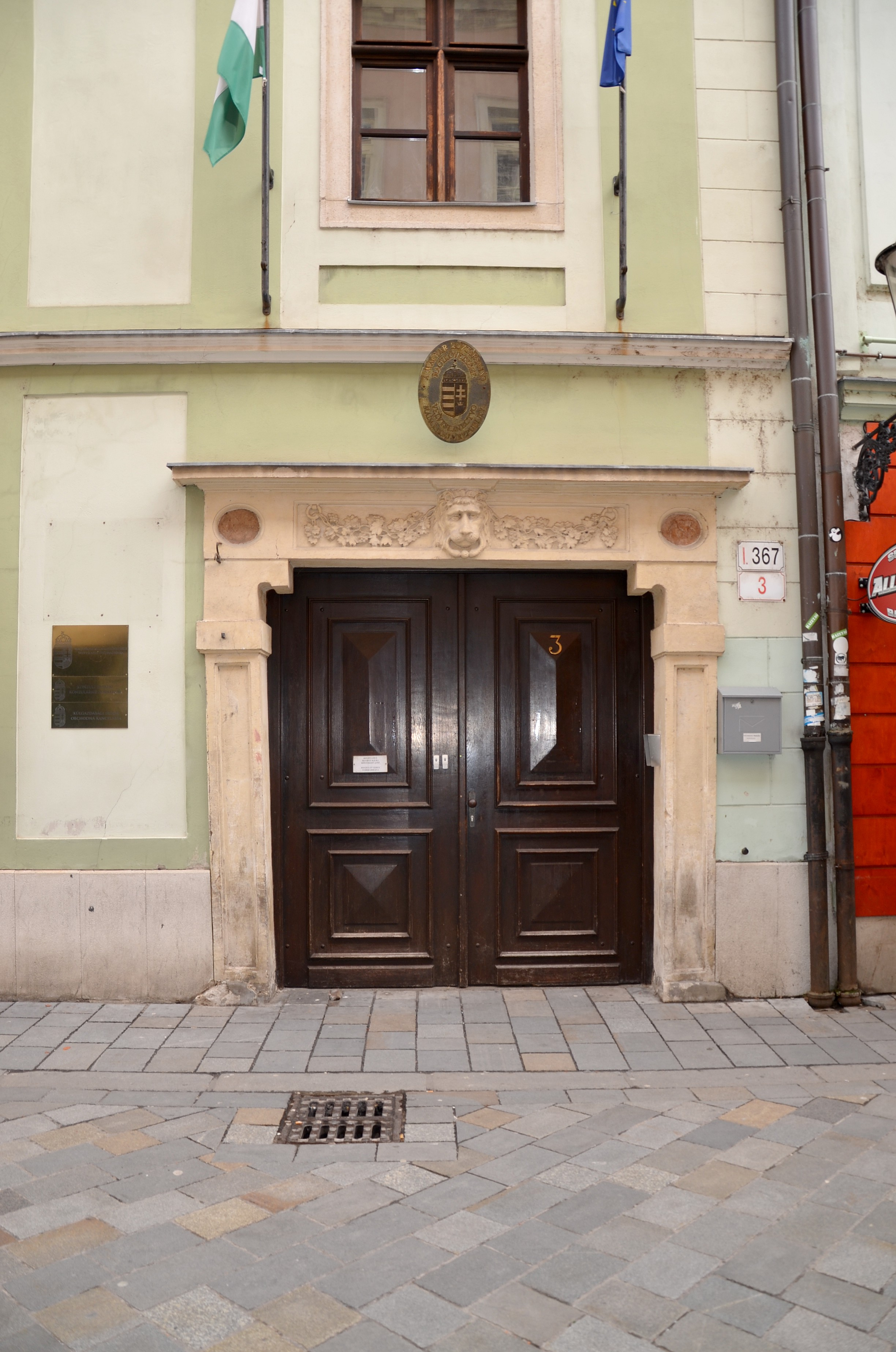 Portál budovy na Sedlárskej ul. č. 3